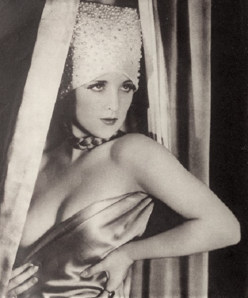 Carole Lombard